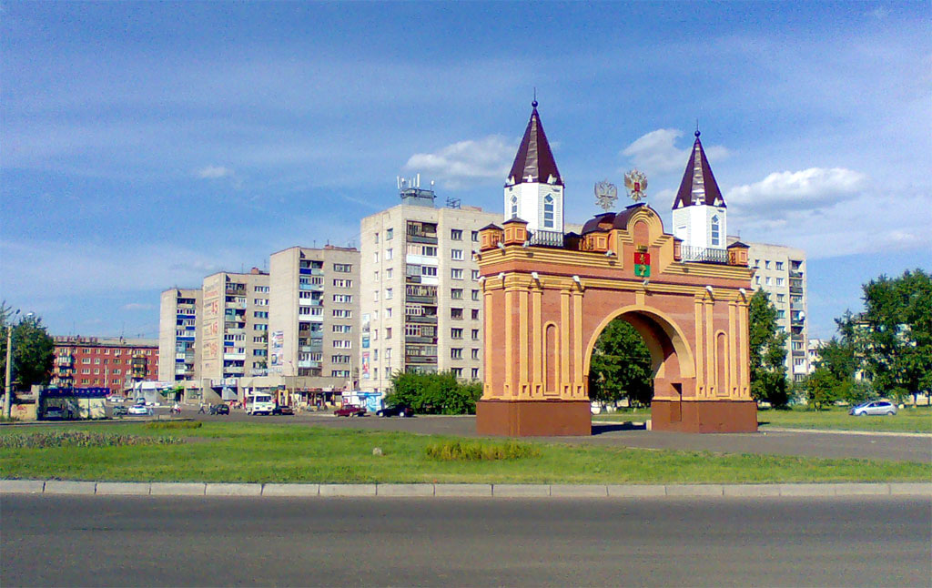 Предмостная площадь, арка, г.Канск